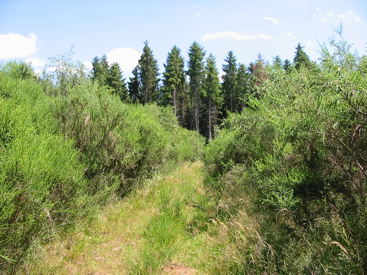 Une lande de genêts sur les hauteurs de La Petite Fosse, près du col de Saint-Gondelbert.